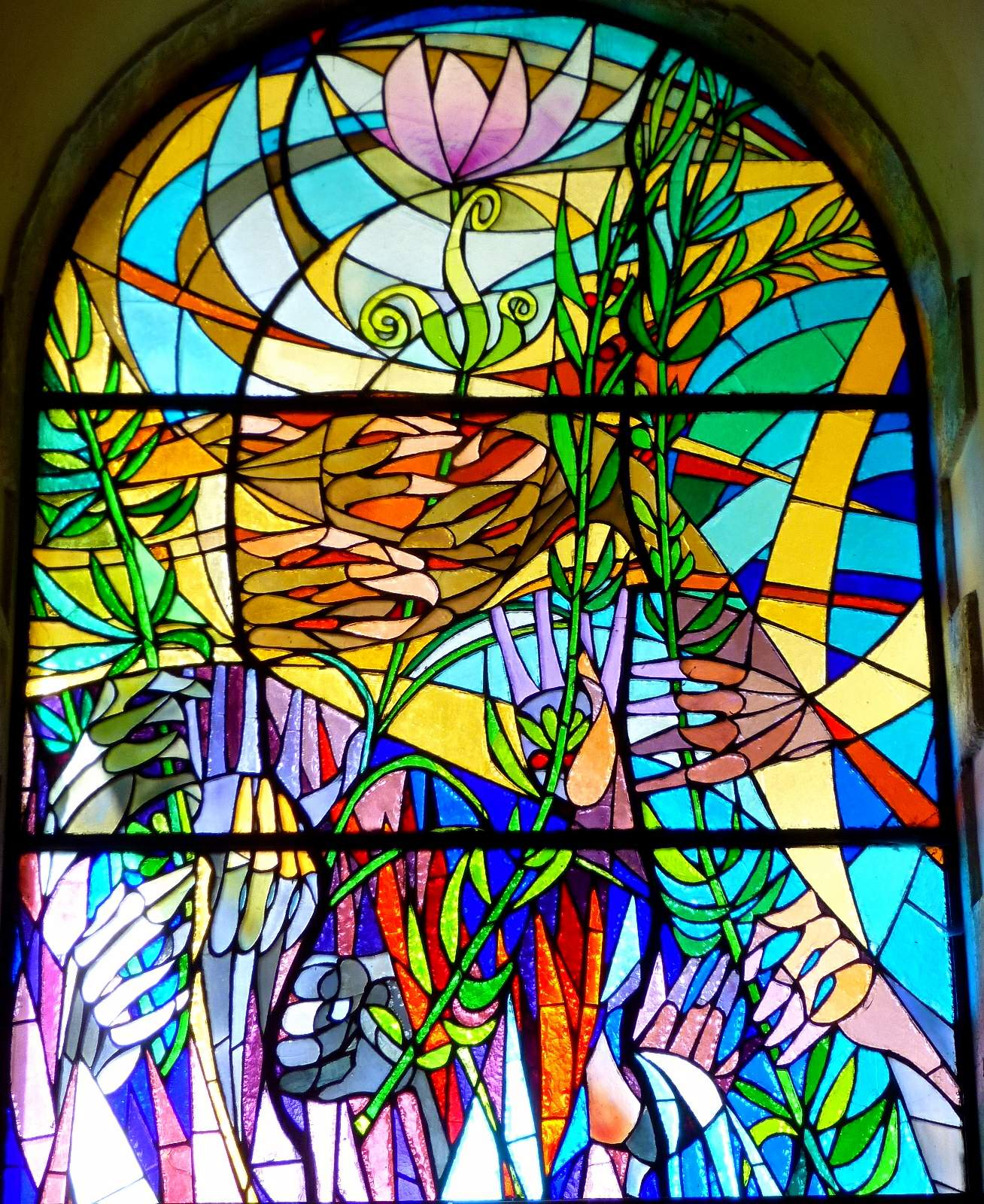 Vidriera en el Santuario de Urkiola (Bizkaia)